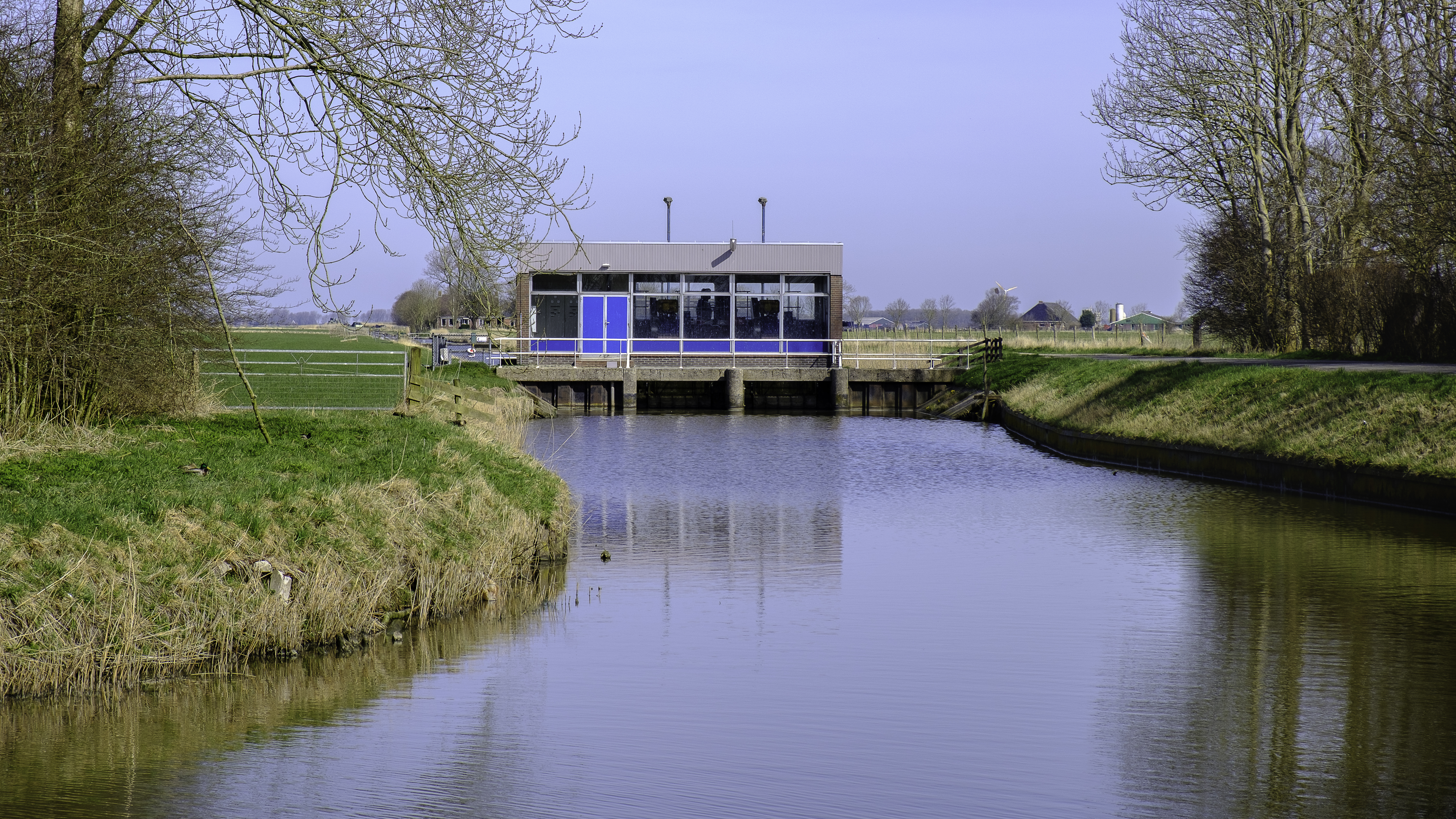 Gemaal De Delthe in de Delthe